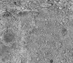 Catena Artamonov, Luna